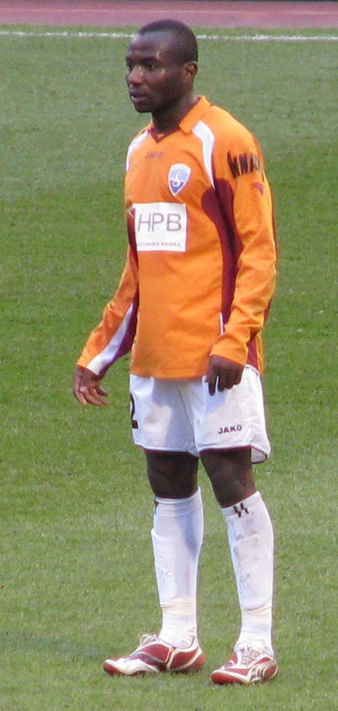 Patrice Kwedi